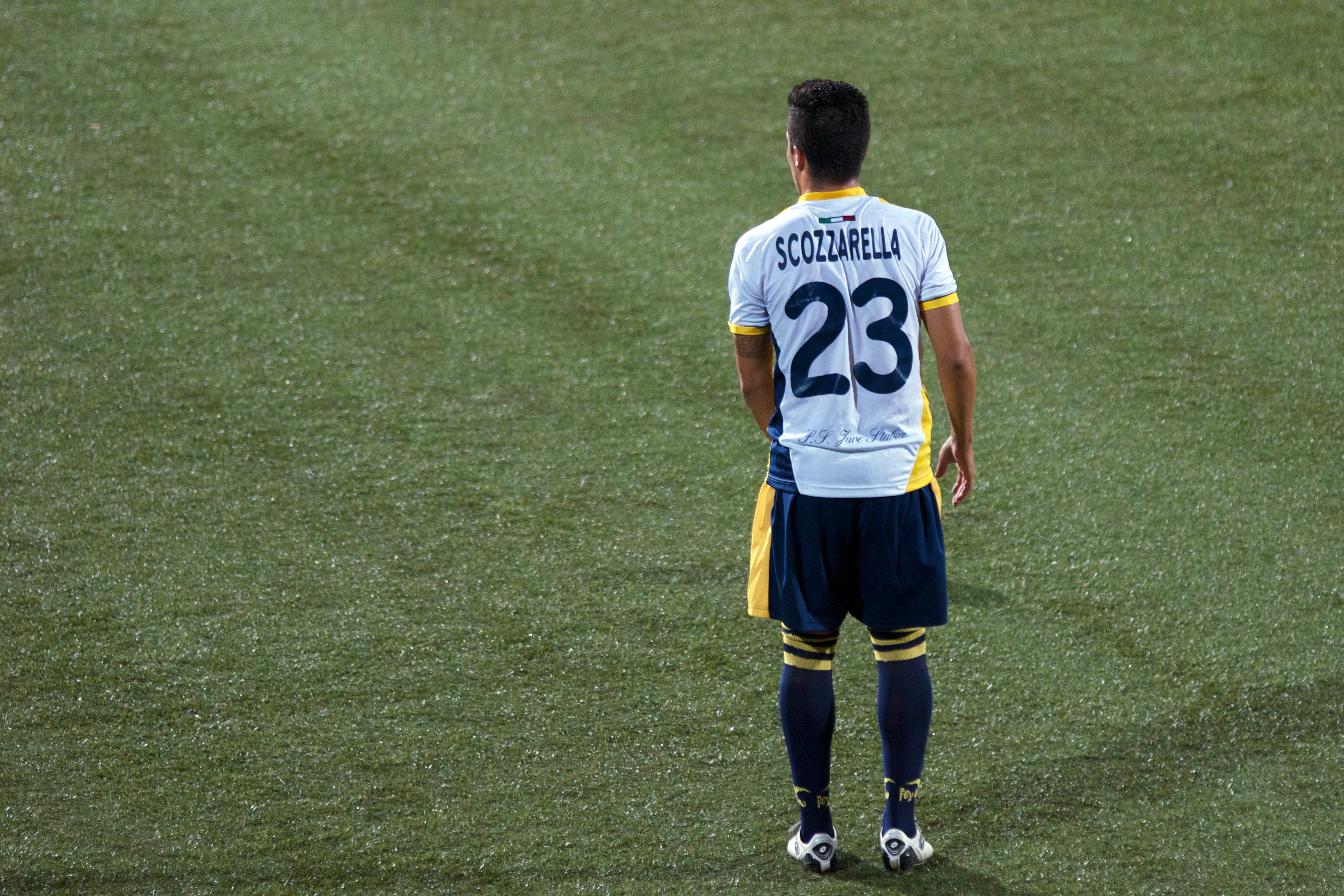 Juve Stabia - Verona, 31 Luglio 2011